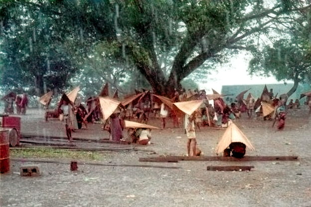 Os timorenses chapéus de chuva(em tetum:saluric)